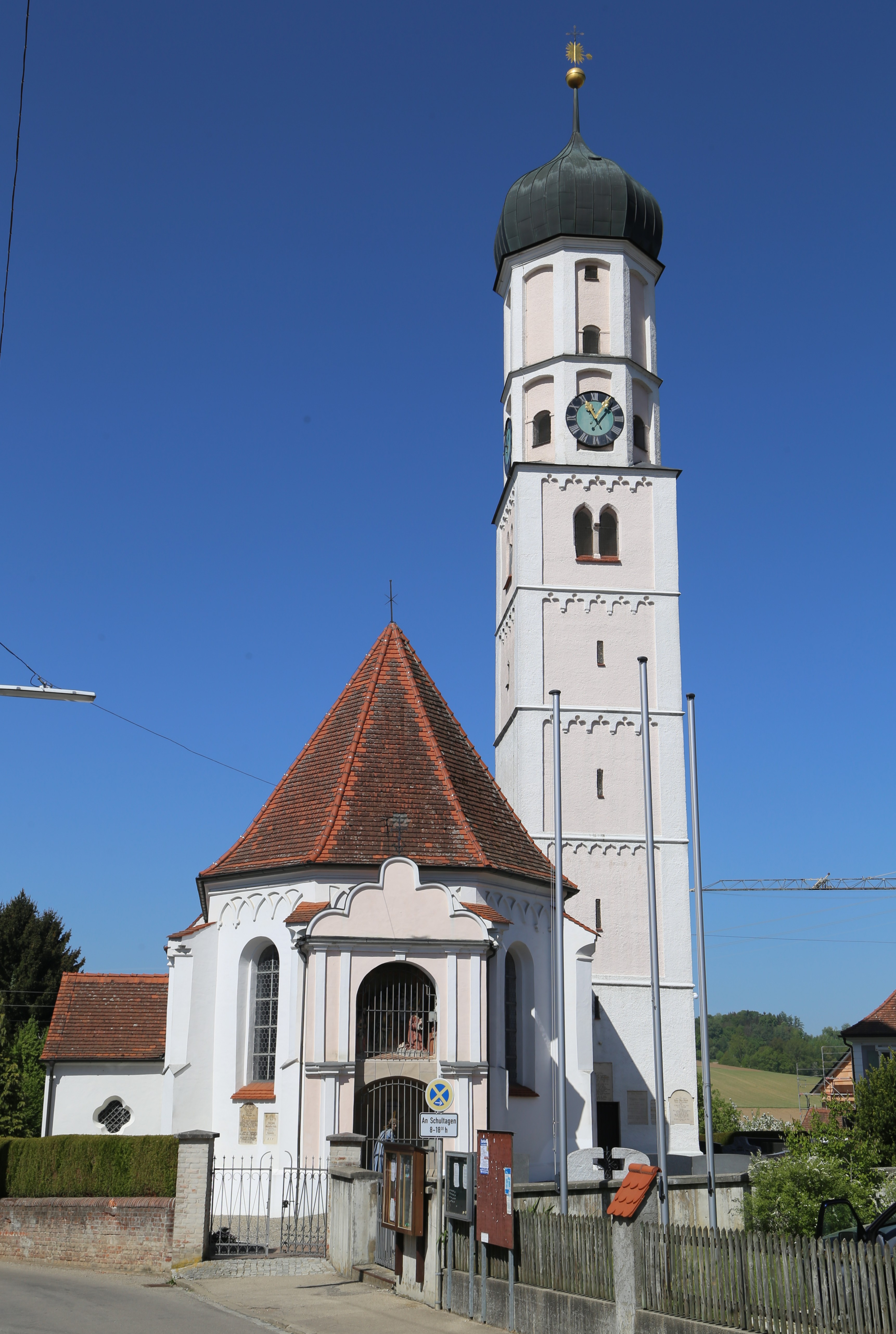 Vitusstraße 4, Steinekirch, Zusmarshausen; Katholische Pfarrkirche St. Vitus, Saalbau mit gotischem Fries, eingezogenem Chor, nördlichem Turm mit Zwiebelhaube und östlich an den Chor angebauter Ölbergkapelle von um 1790, spätgotischer Bau des späten 15. Jahrhunderts, barocker Ausbau 1760, Turmuntergeschosse 13./14. Jahrhundert; mit Ausstattung; Friedhofsmauer.